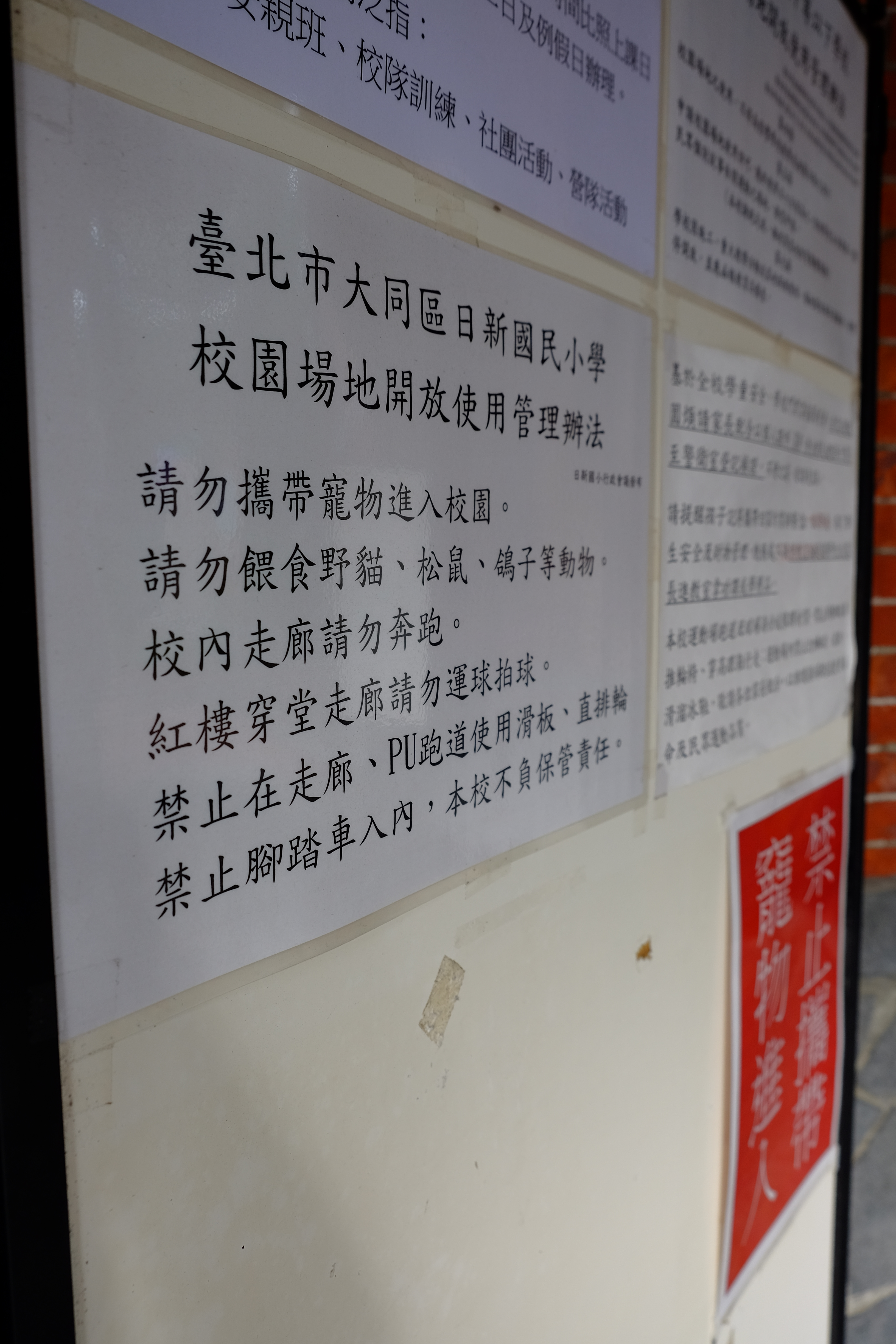 中文（台灣）: 臺北市大同區日新國民小學公布欄。